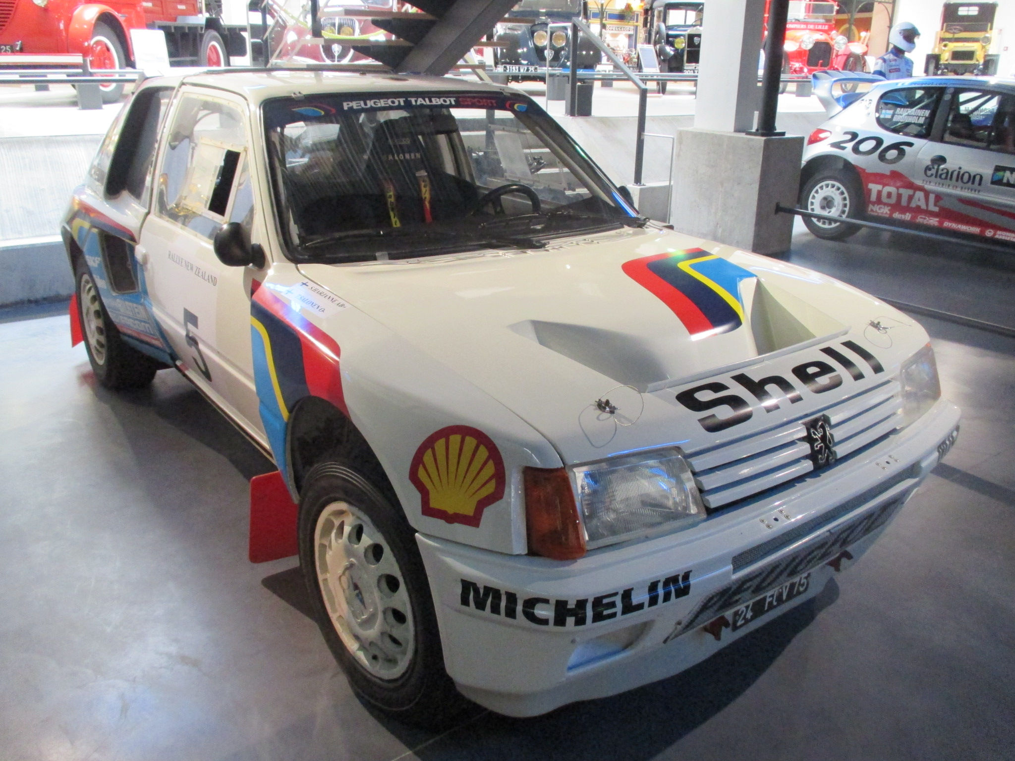 Peugeot 205 Turbo 16 Rallye Evolution 1 Groupe B 320 chevaux, musée de l'aventure Peugeot de Sochaux